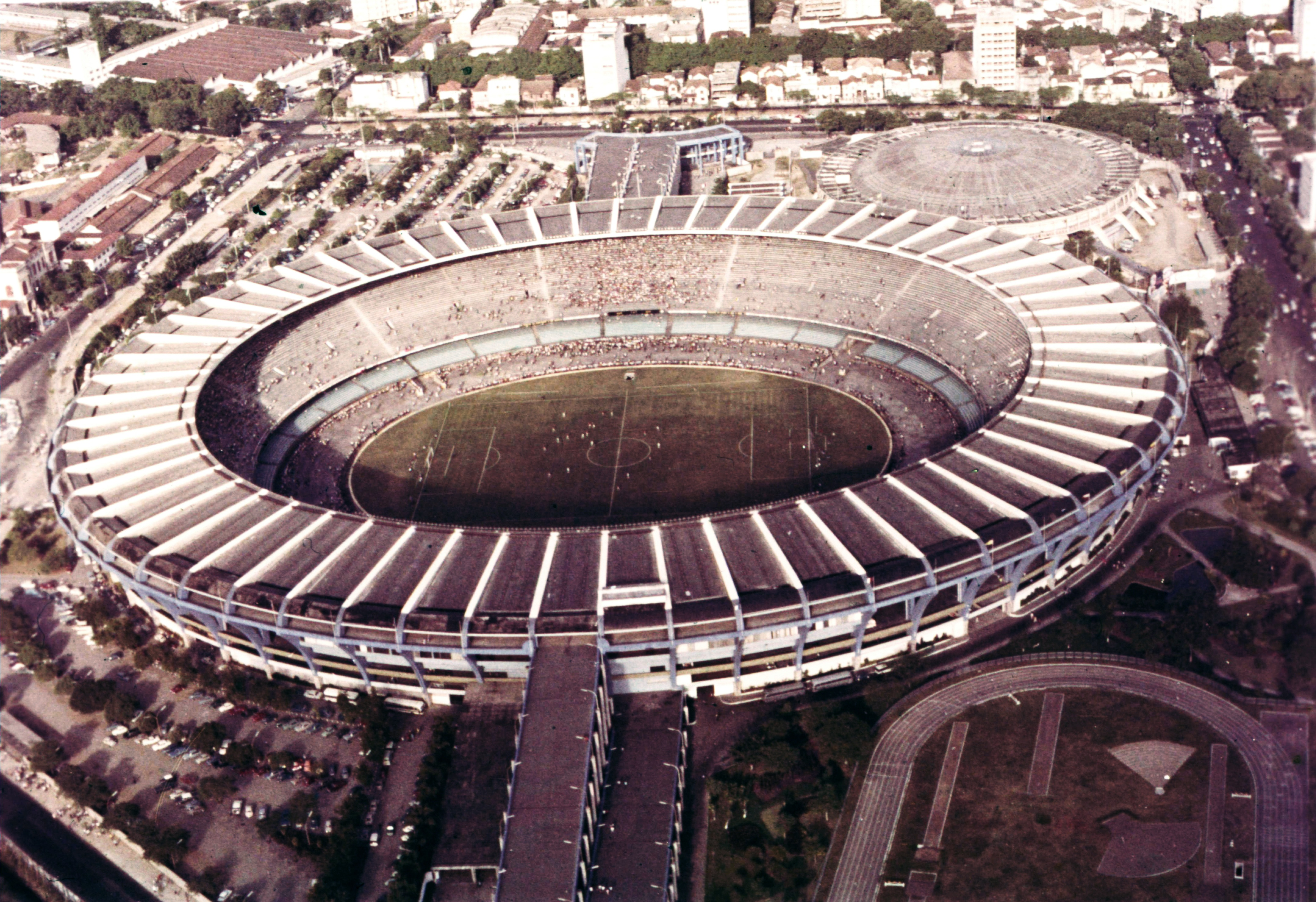 Maracanã Stadion. Location: Brazil Tags: stadium, colorful Title: Maracanã Stadion.